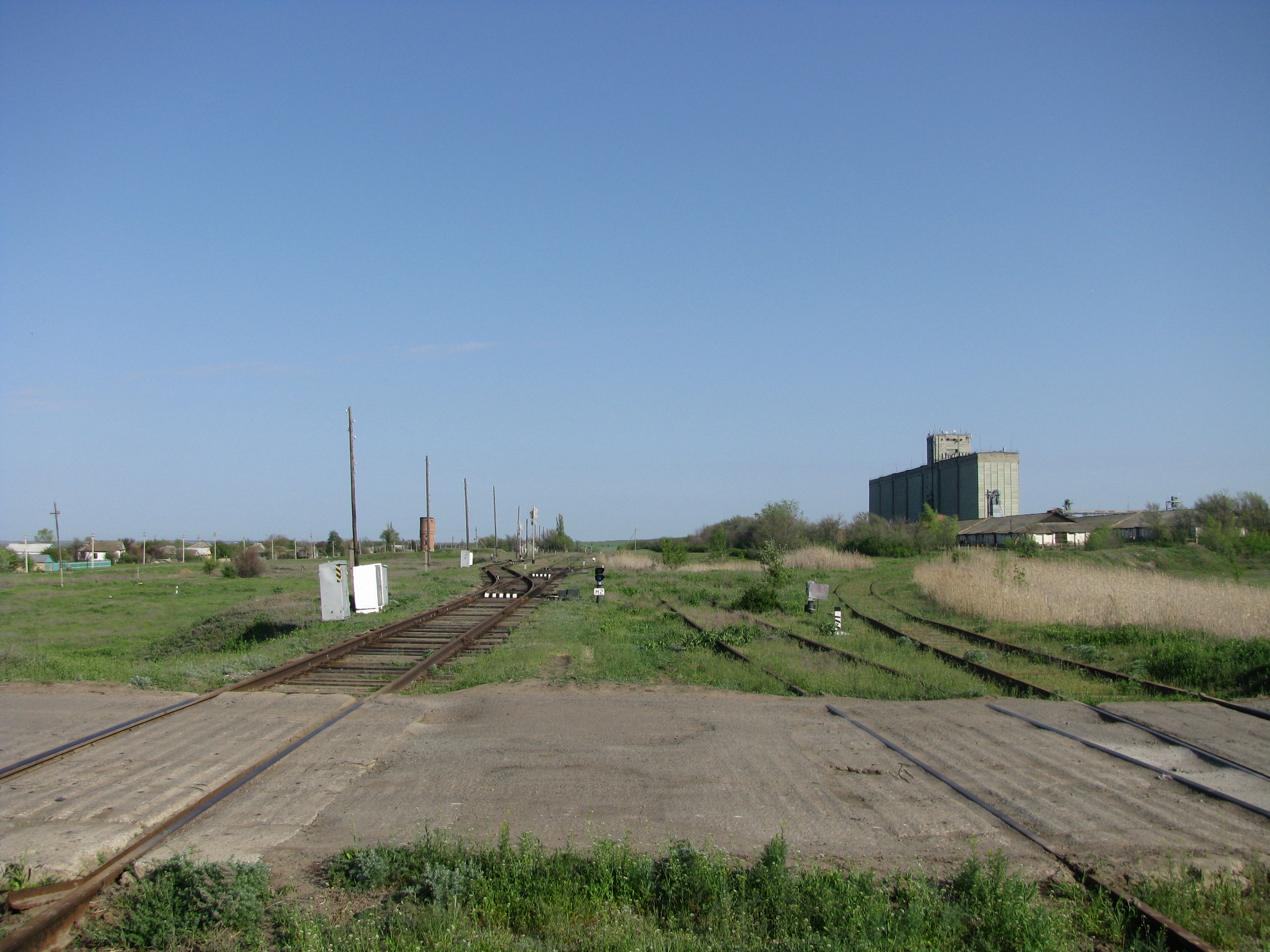 Станция Черкасская Южная горловина